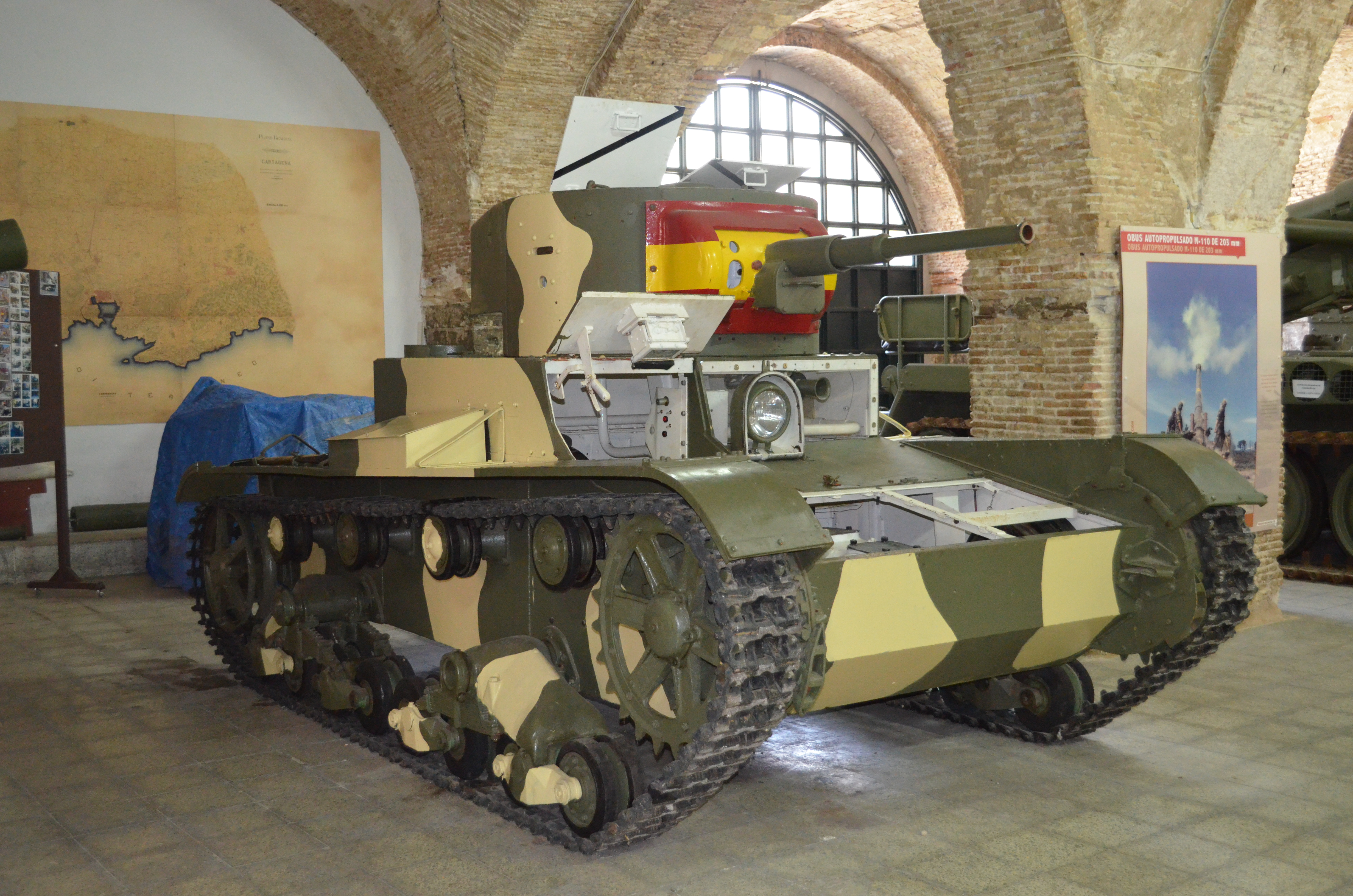 T-26B